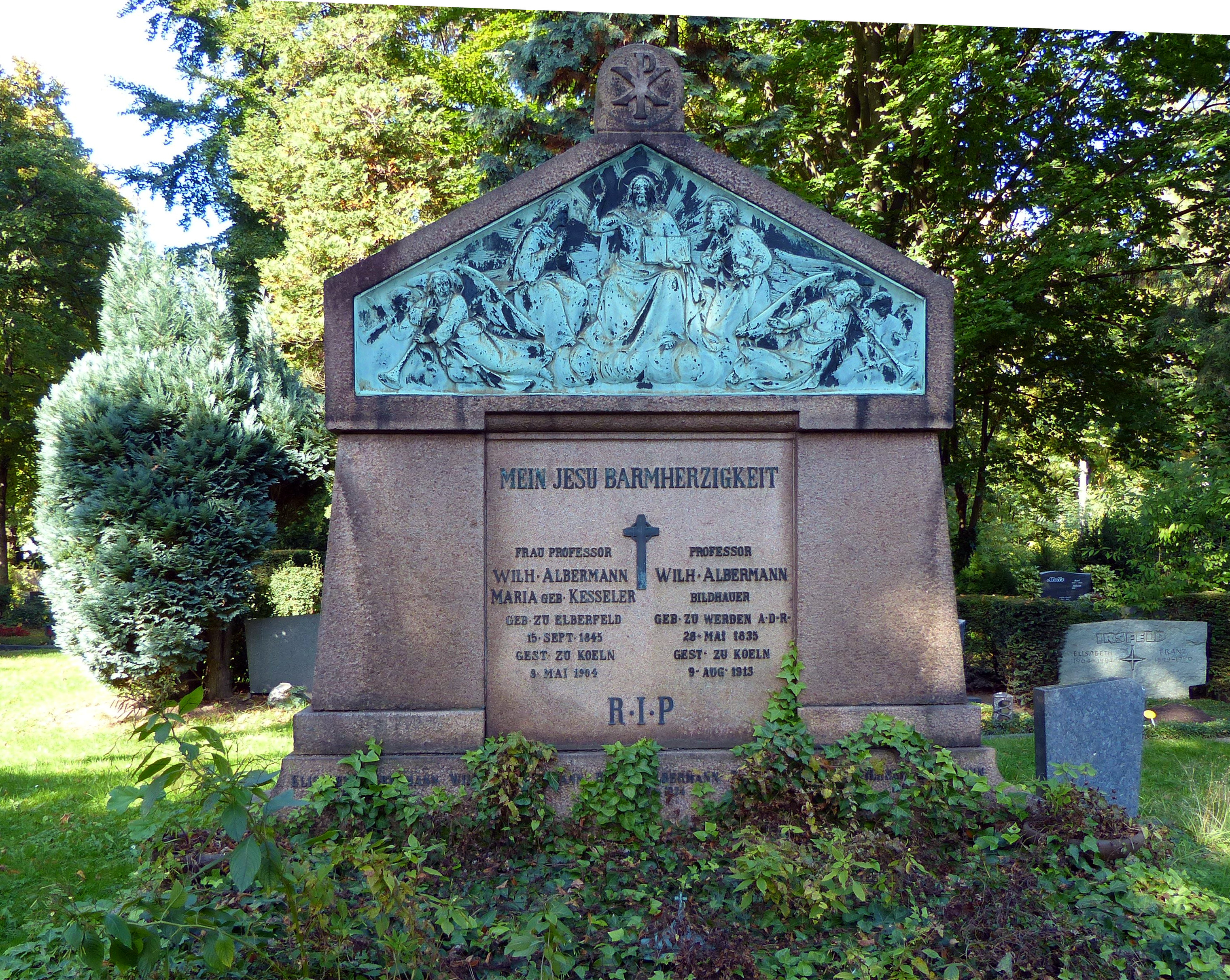 Melaten-Friedhof, Aachener Str. 204, Grabanlage Wilhelm Albermann (28.5.1835 bis 9.8.1913)This is a photograph of an architectural monument.